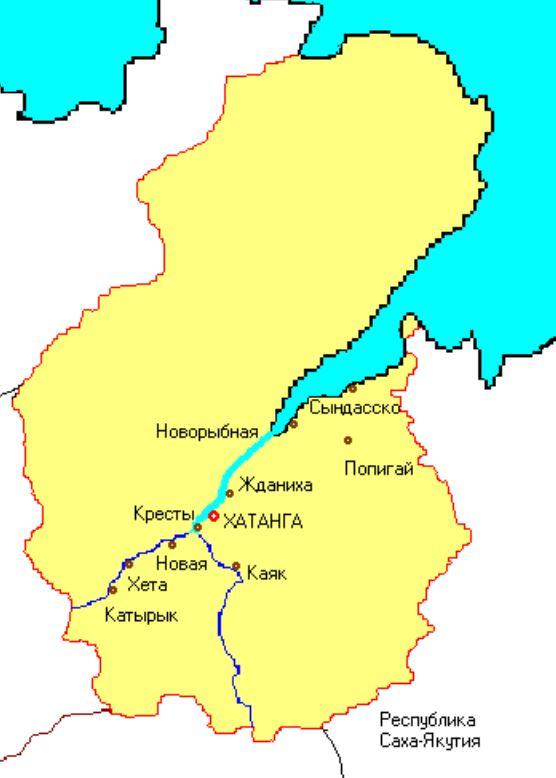 Сельское поселение Хатанга